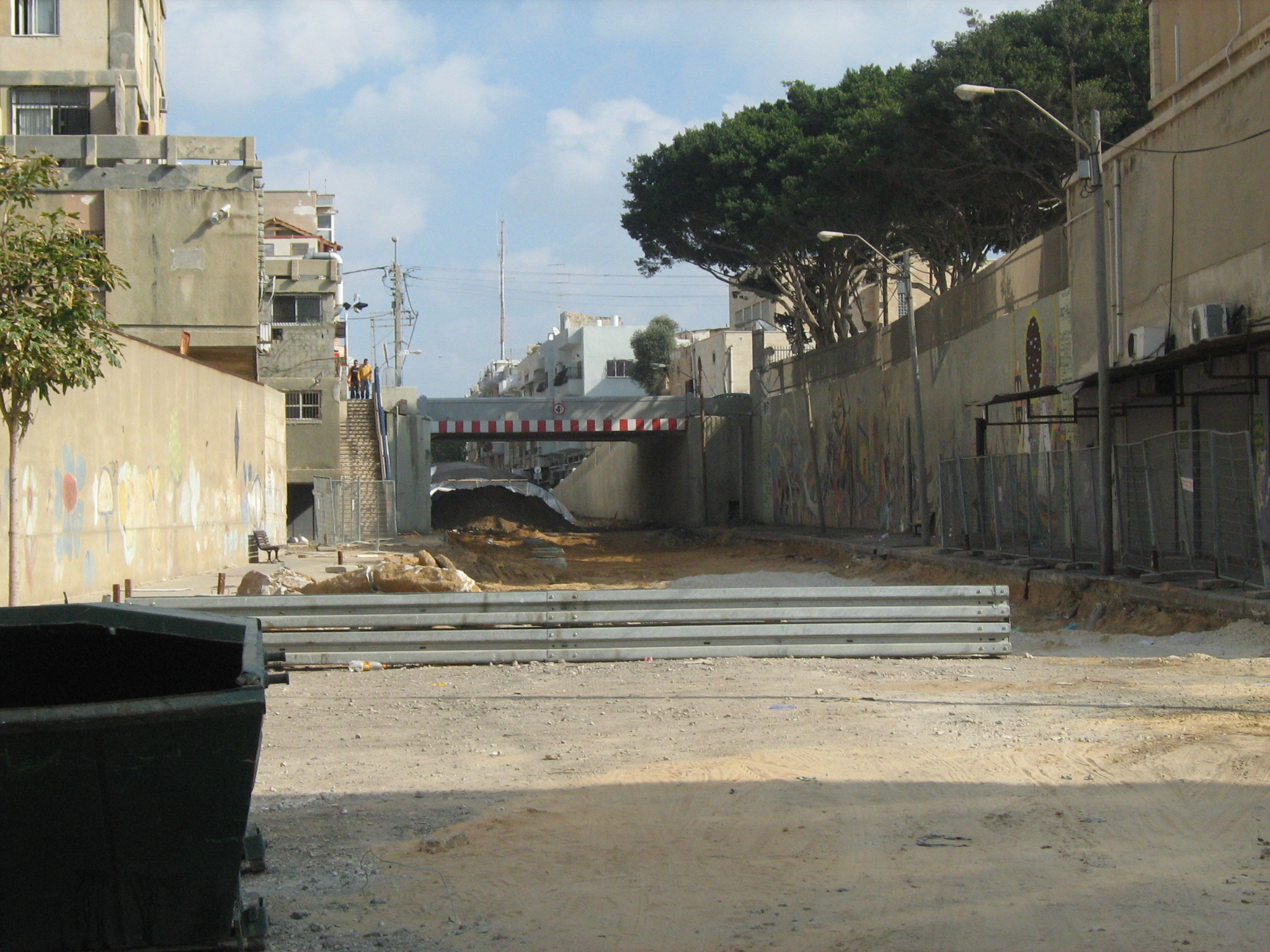 גשר יהודה הימית - פברואר 2009